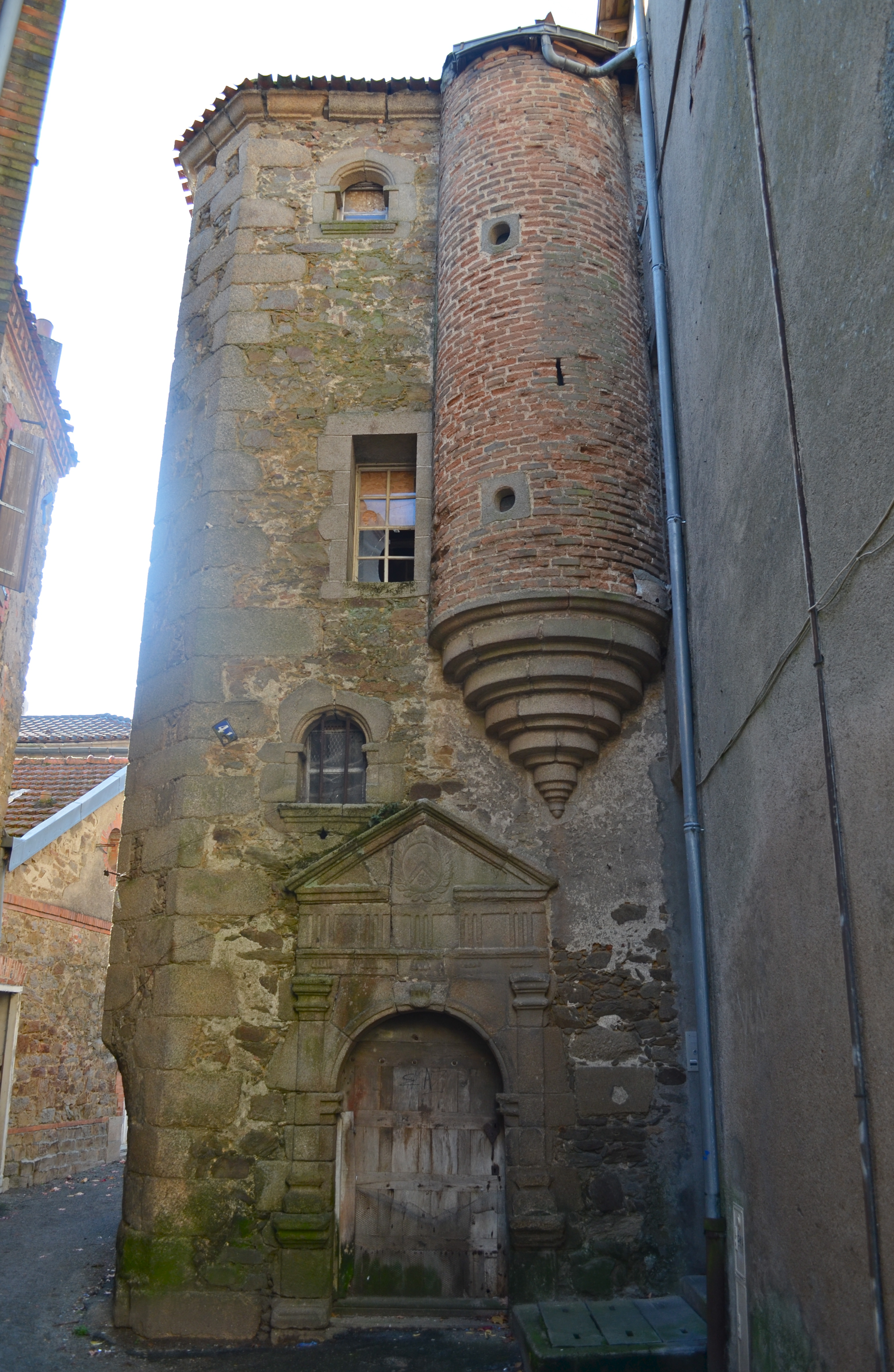 Tour du Grenier à sel - Cholet (Maine-et-Loire)